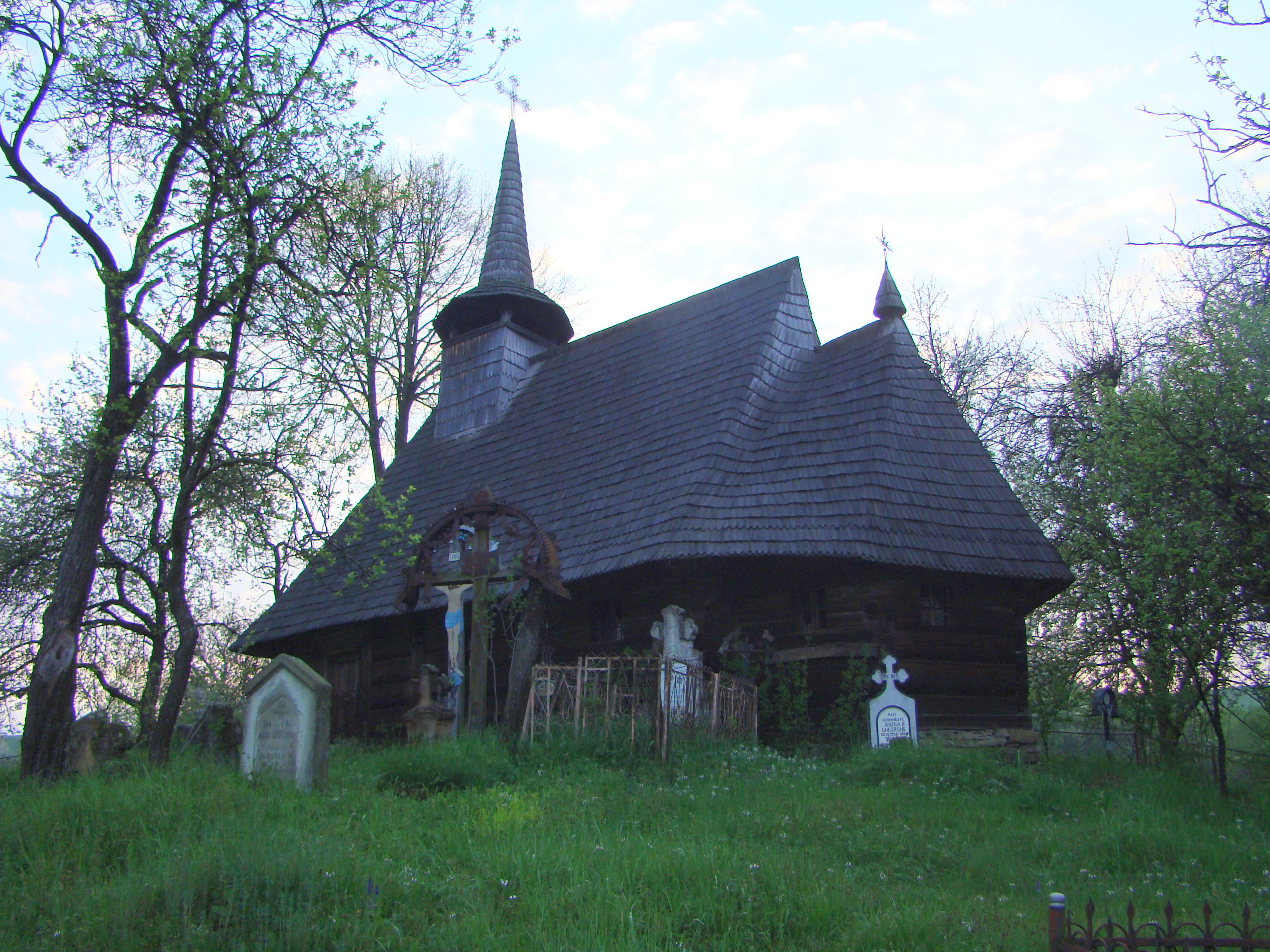 Biserica de lemn "Sfântul Dumitru", sat LARGA; comuna SUCIU DE SUS